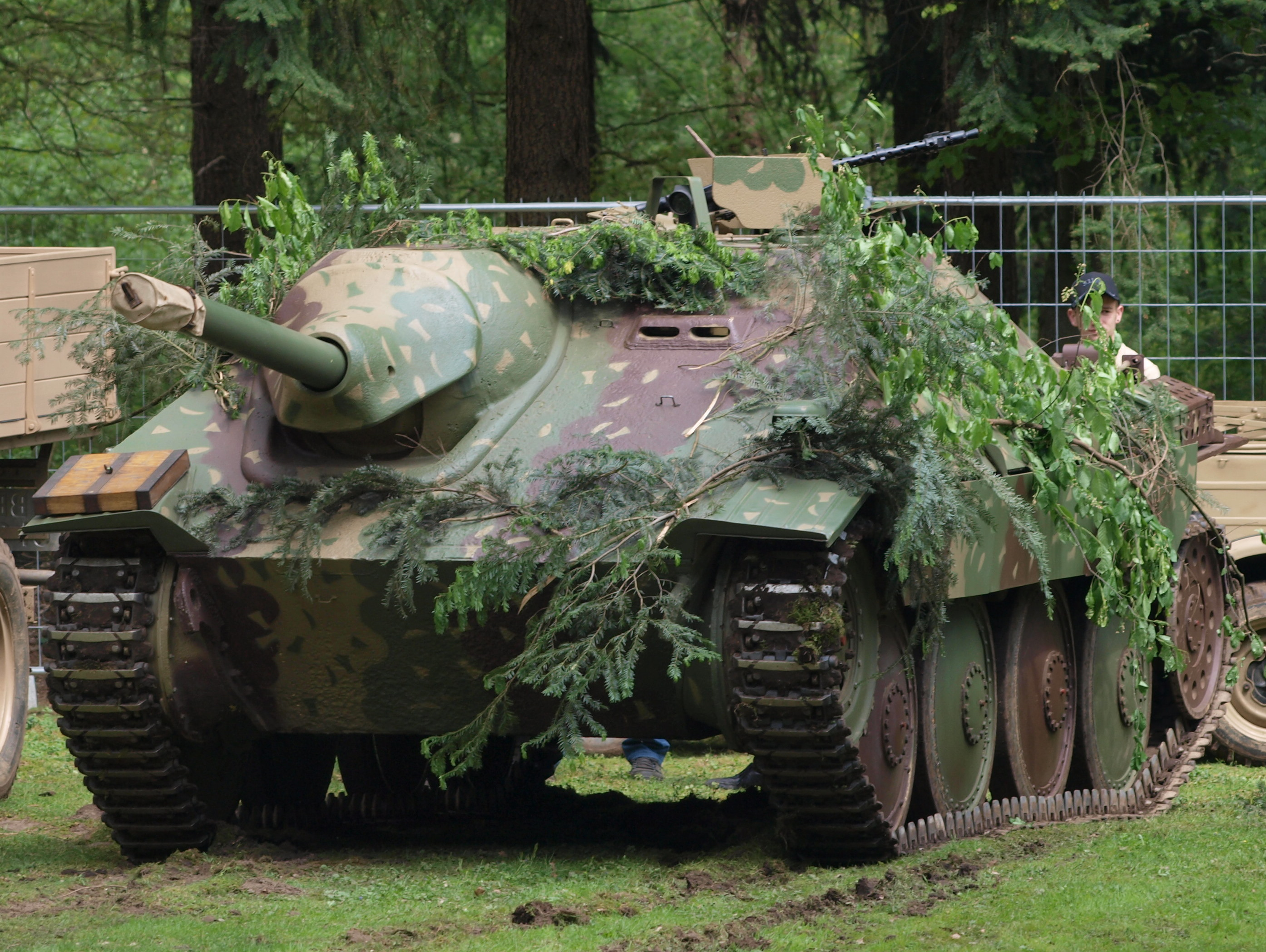 Jagdpanzer 38(t) (Sd.Kfz. 1382) Hetzer (baiter)